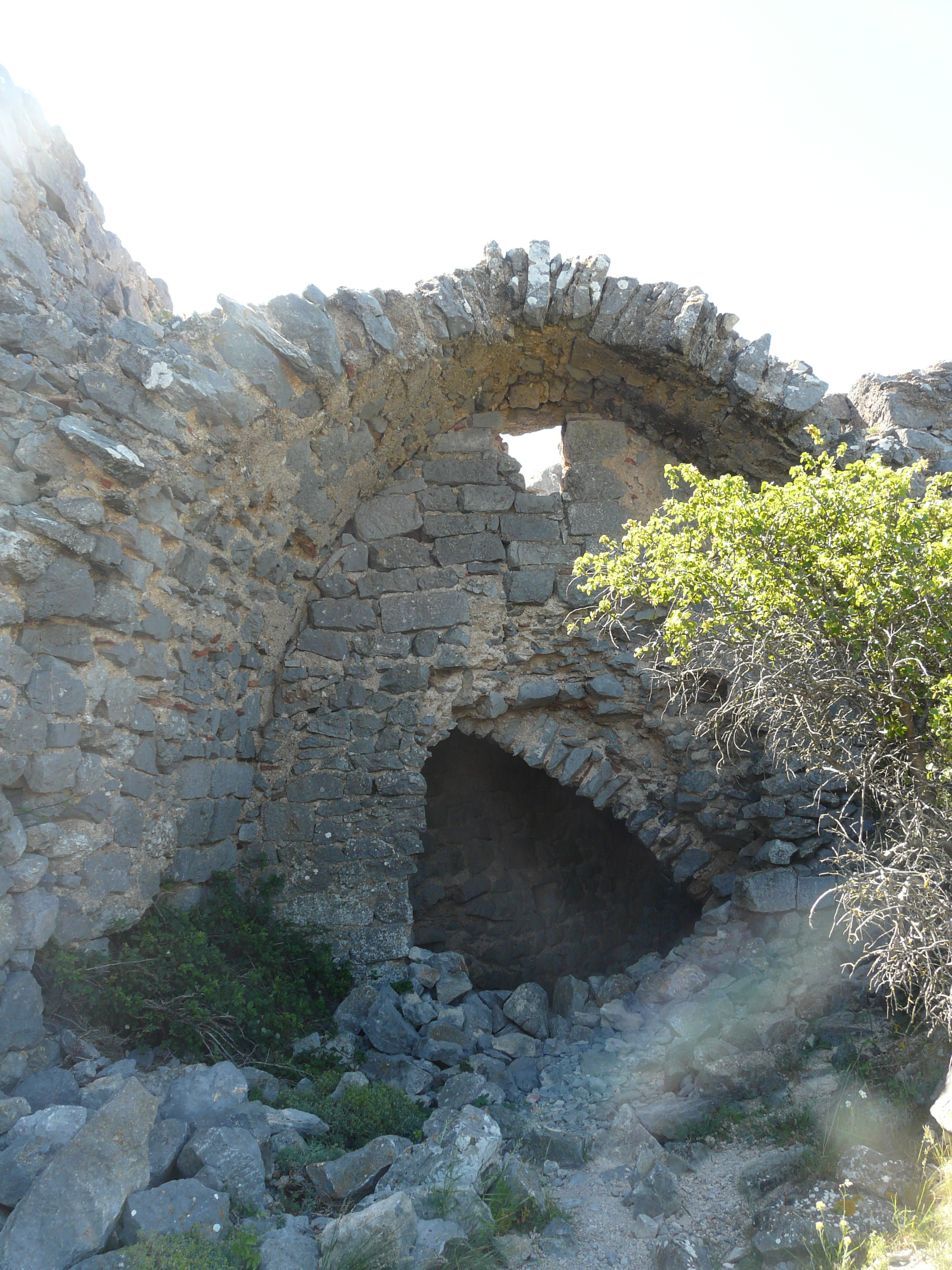 Potser capella de Sant Llorenç del Castell de Salvaterra, o d'Òpol